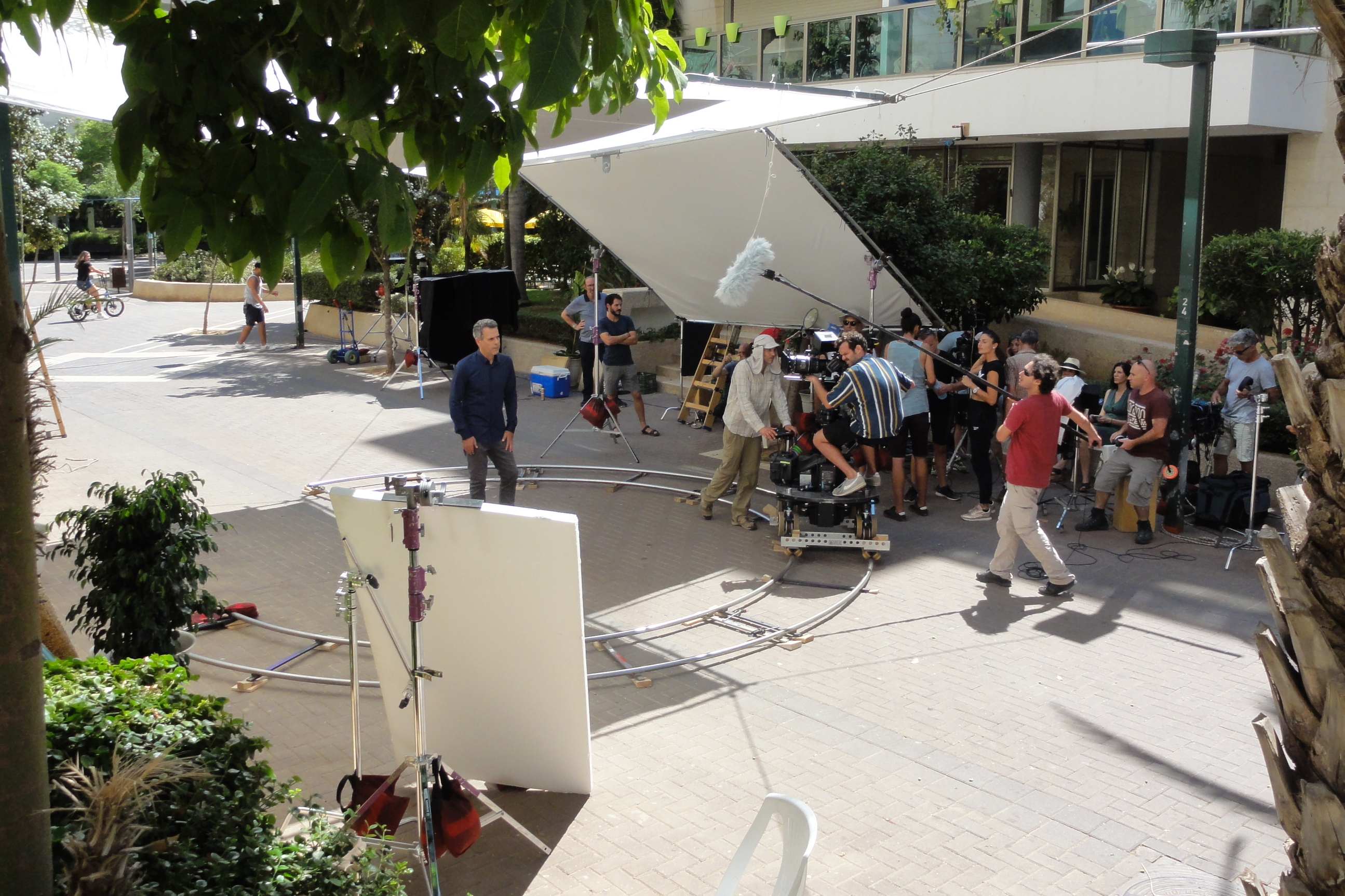 צילום סרט